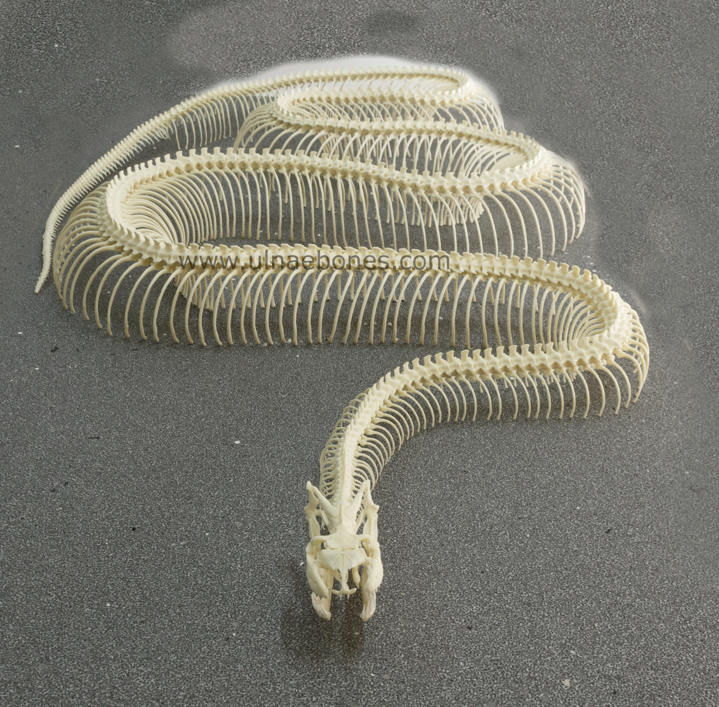 Esqueleto montado de Eunectes murinus. 5,5 metros de longitud